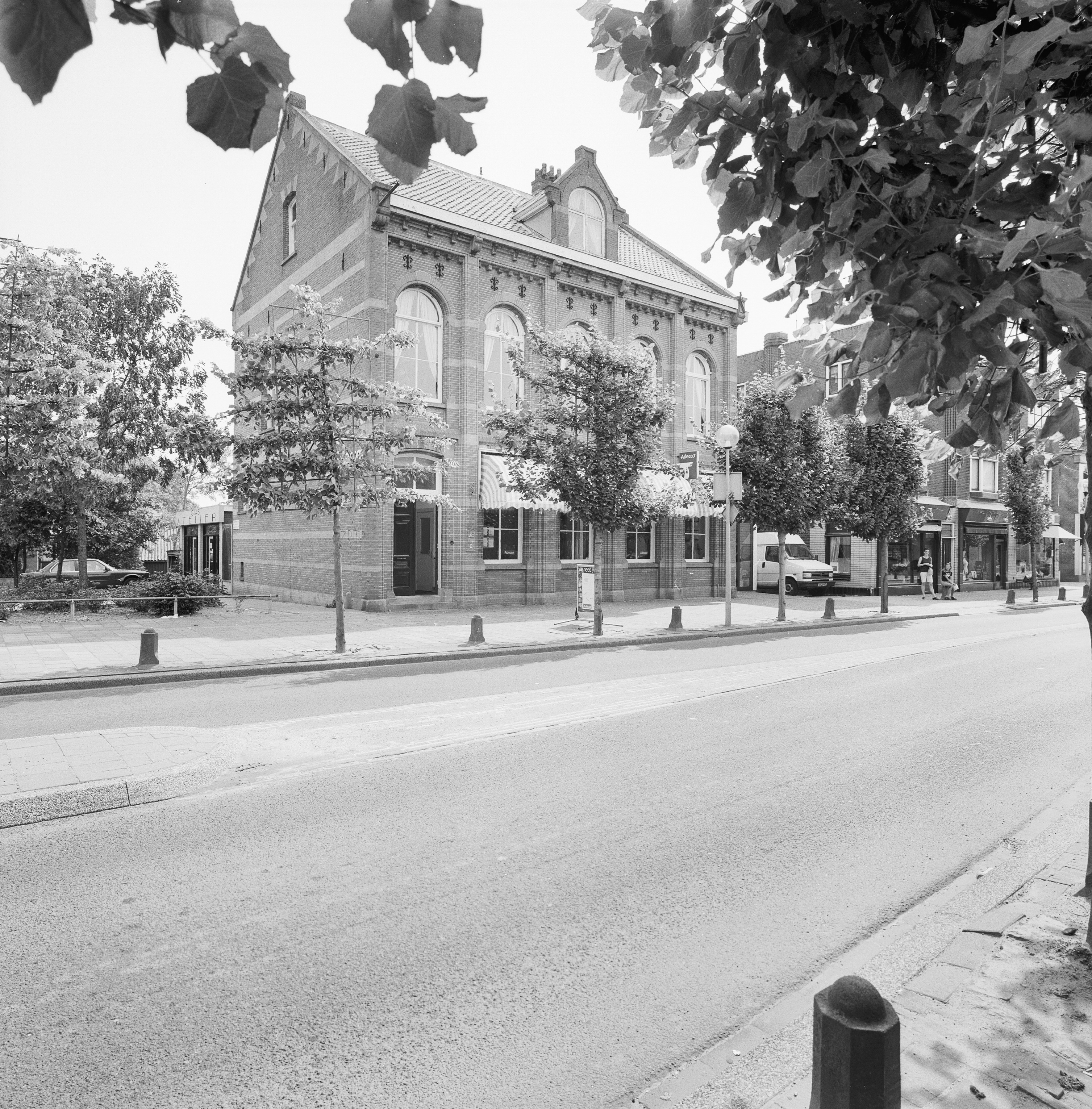 Voormalig kantongerecht: Overzicht voorgevel en linker zijgevel (opmerking: Gefotografeerd voor Monumenten In Nederland Gelderland)